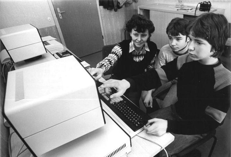 Dittersdorf, Schüler an einem Computer Zum Beitrag: Als Lehrer delegiert zum Bauernkongreß - Von lebensnahem Unterricht und der Zukunft im Dorf ADN-ZB Kasper - 27.4.1987 - ha. Einmal in 14 Tagen räumt Christa Purfürst in der LPG "Seenplatte" Dittersdorf ihren Platz, den dann Mitglieder der Arbeitsgemeinschaft Oettersdorf im Kreis Schleis einnehmen. Unter den sechs Schülern der 9. Klasse befinden sich auch Reiko Tiersch (links) und Jürgen Wünsche (rechts), die bereits viel gelernt haben. Reiko will einmal in der LPG "Seenplatte" arbeiten, vielleicht sogar am Computer. (Hierzu gehören 1987-0427-301 - 303 N)